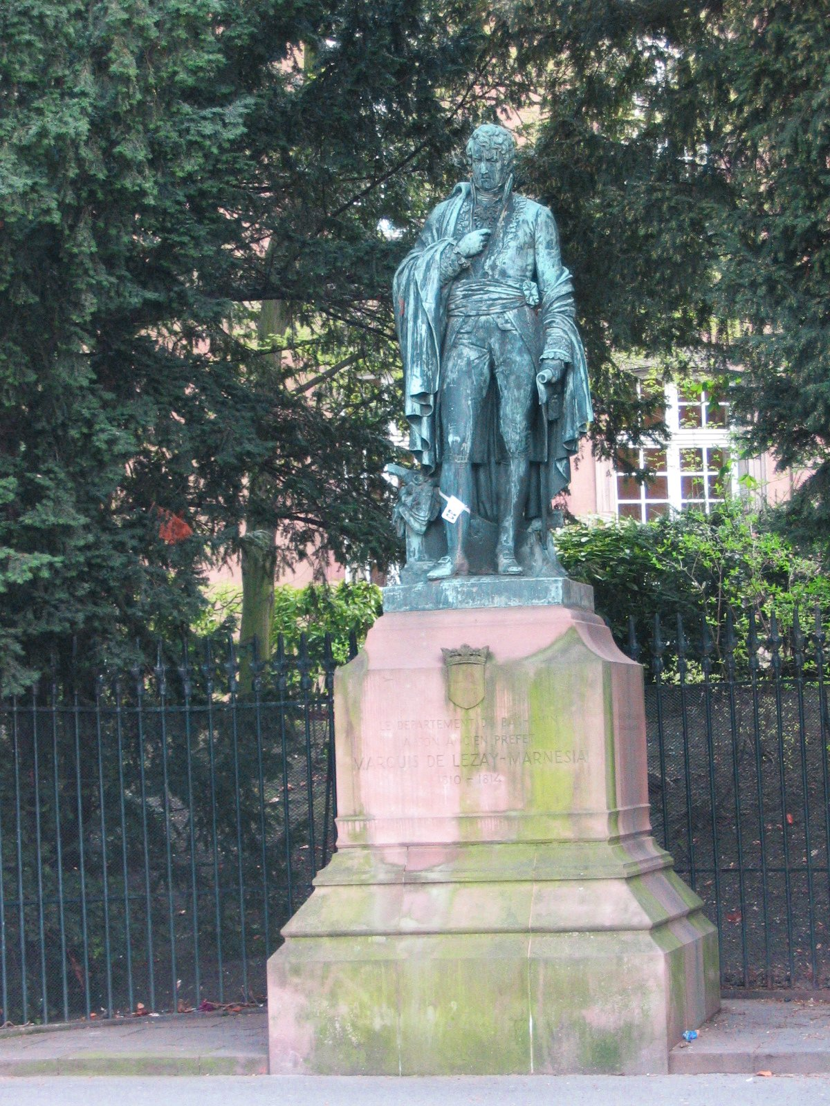 Statue du préfet Adrien de Lezay-Marnésia devant l'hôtel Klinglin à Strasbourg.